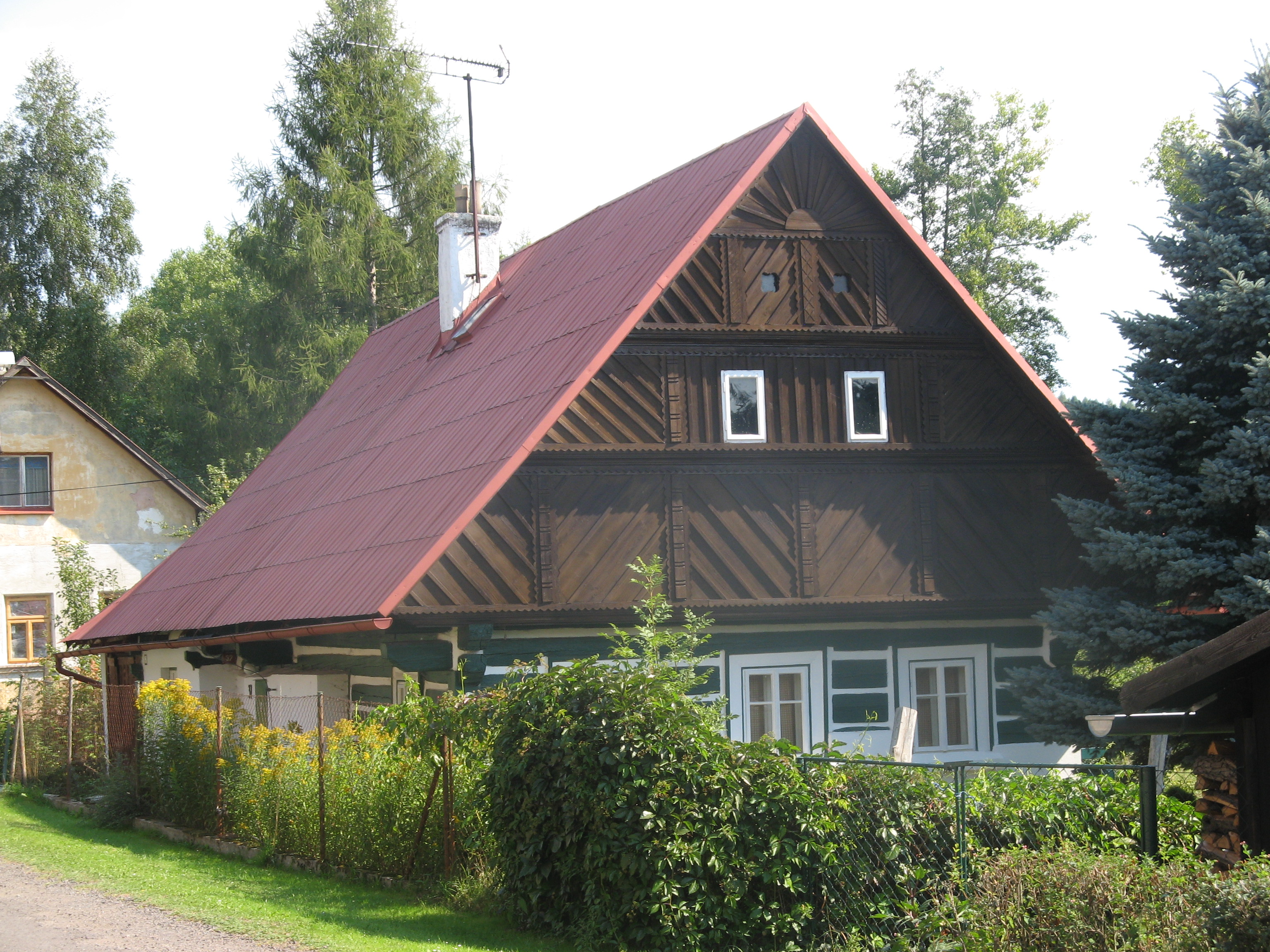 Dům podkrkonošské lidové architktury ve Žďár u Staré Paky